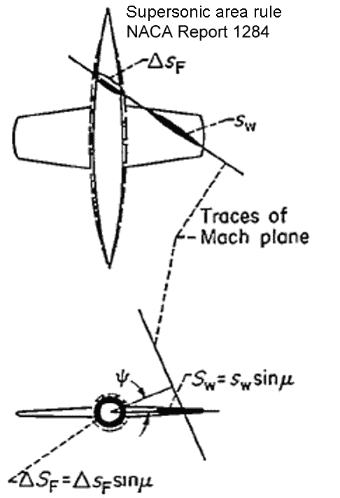 Supersonic area rule